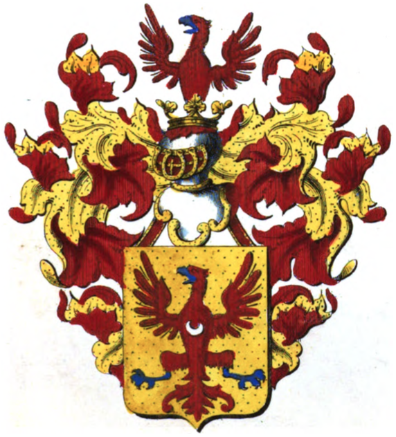 Armoiries de la famille d'Orjo de Marchovelette